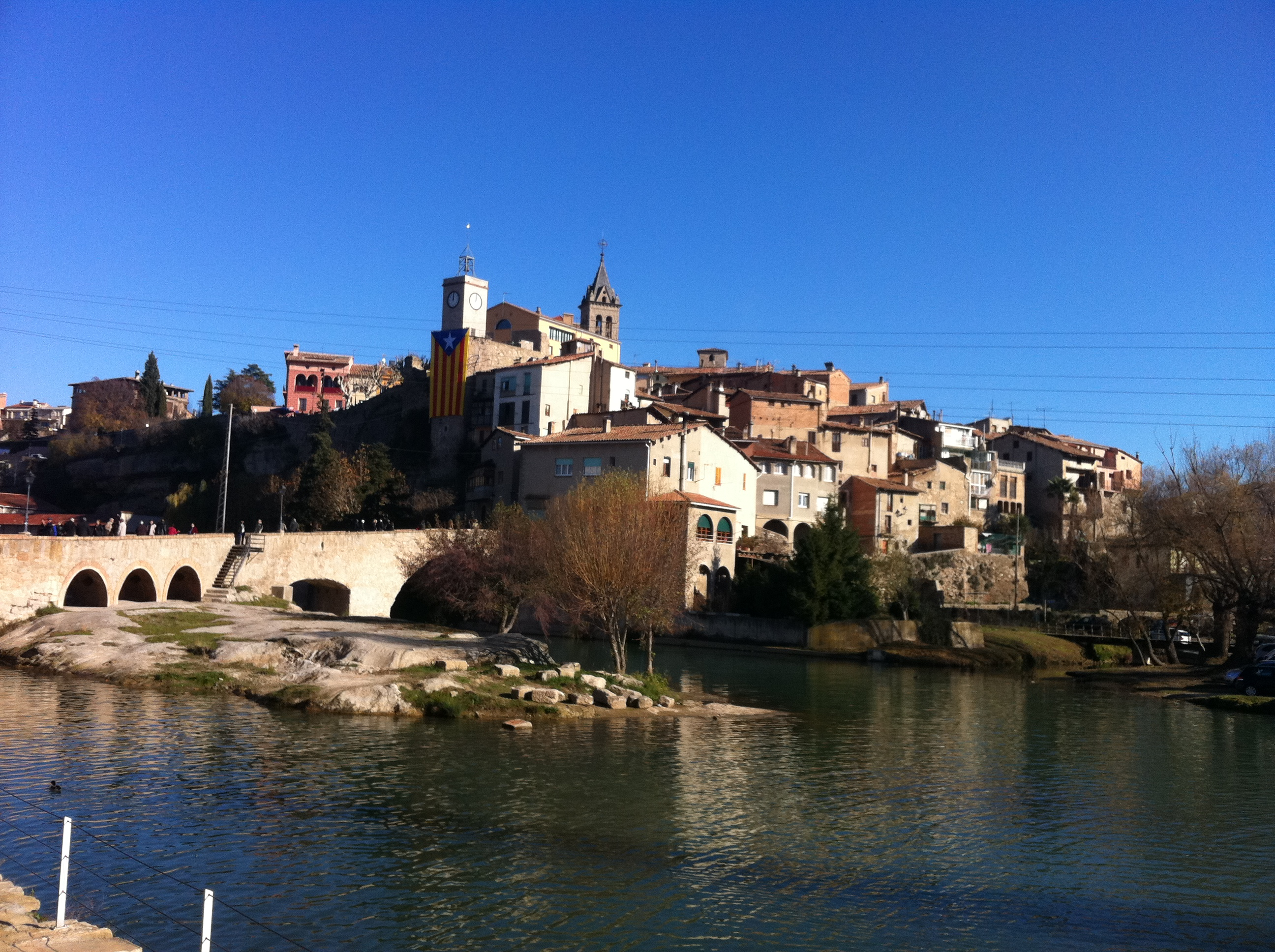 Imatge del pont antic de gironella i el nucli antic de la vila. També es veu la confluència del riu Llobregat i de la riera d'Olvan.